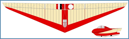 Horten H1